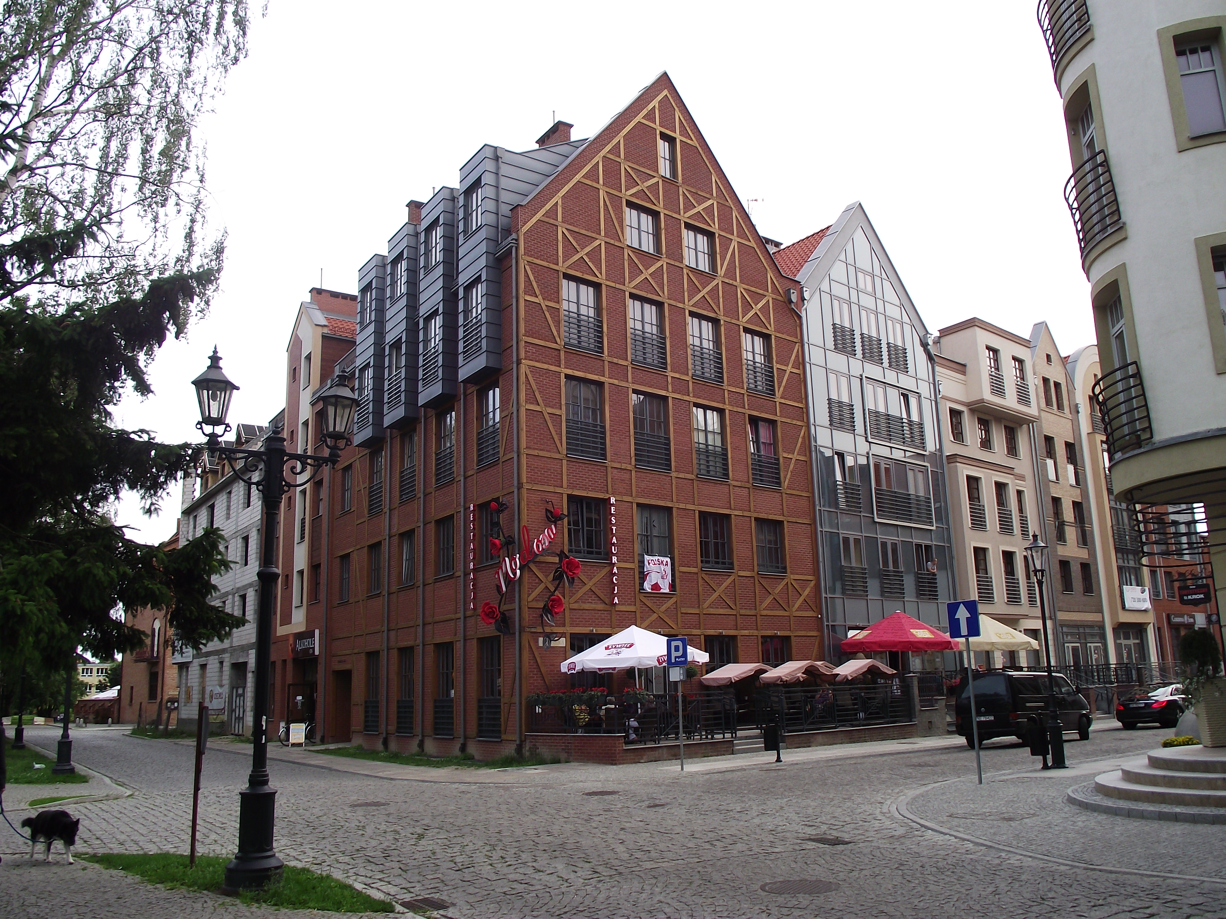 Elbląskie kamienice